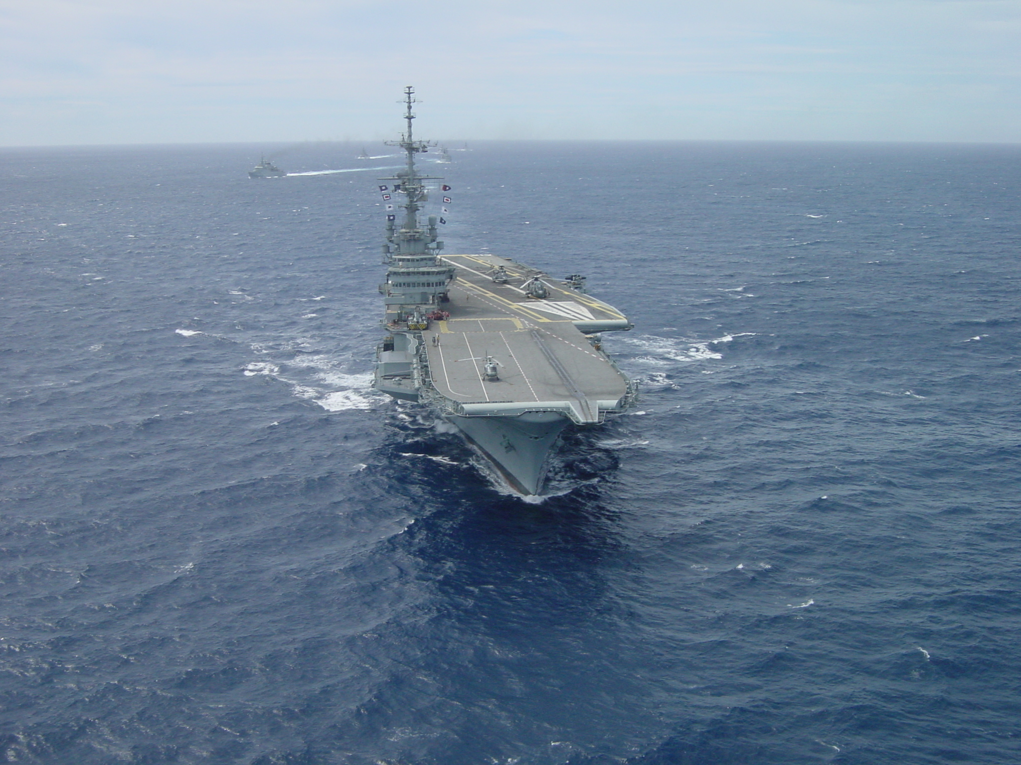 Arquivo liberado pela Marinha do Brasil através de projeto GLAM com Wiki Educação Brasil